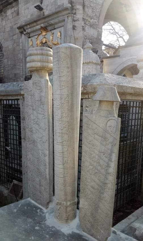 Ali Muhiddin Hacı Bekir Efendi ve Oğullarına Ait Mezar Taşları